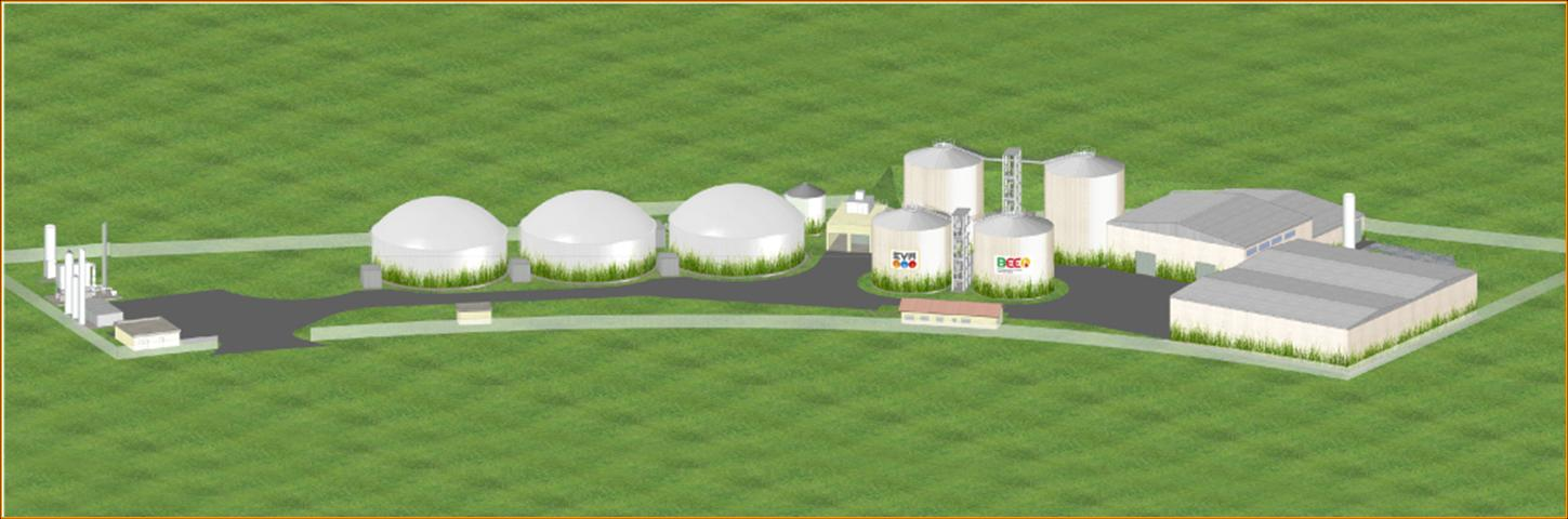 Bio-Erdgas-Anlage Boppard Hellerwald